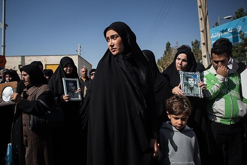 پشت صحنه فیلم و سریال معراجی ها